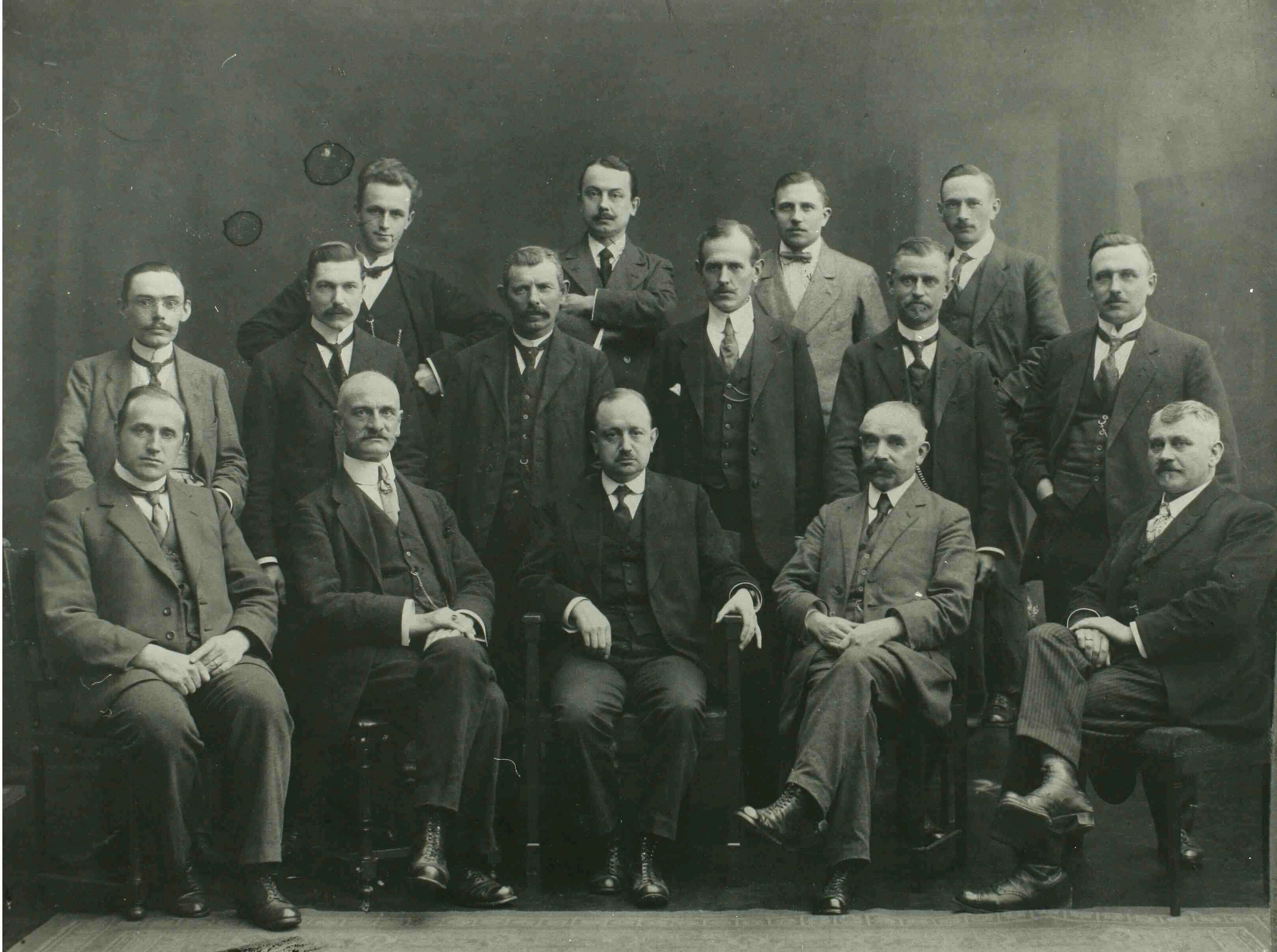 Groepsfoto. bij het afscheid van Ir. Ruckert, Zittend v.l.n.r. Jan Drijvers, F. Hammacher, Ir. J.H.E. Ruckert Hermans, M. van der Putte staand 1e rij: G. Huijboom, F. Boermans, Dufrasnes, onbekend, Bernard Mulders 2e rij: onbekend, onbekend, Willem Jansen, Hub. Willemsen